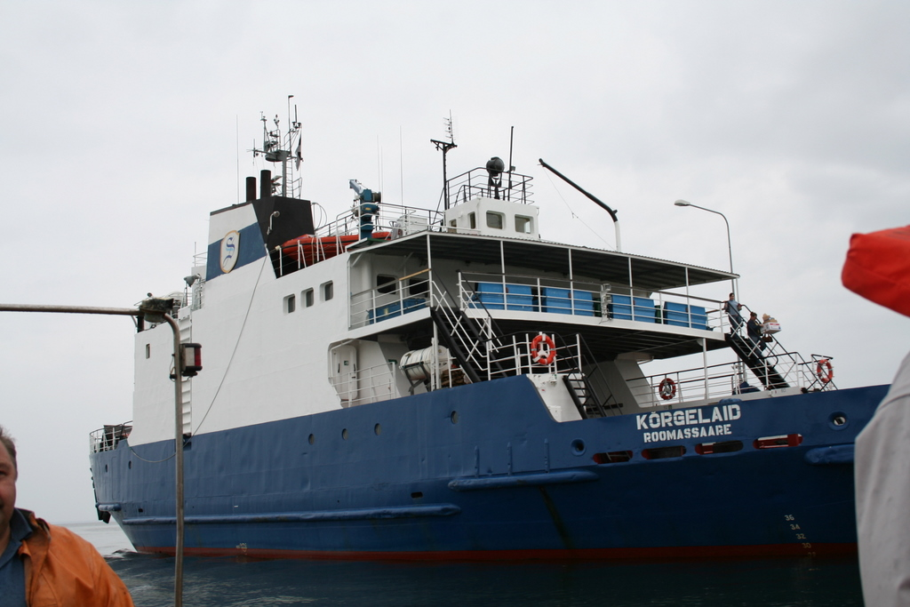 Kõrgelaid Sõru sadamas